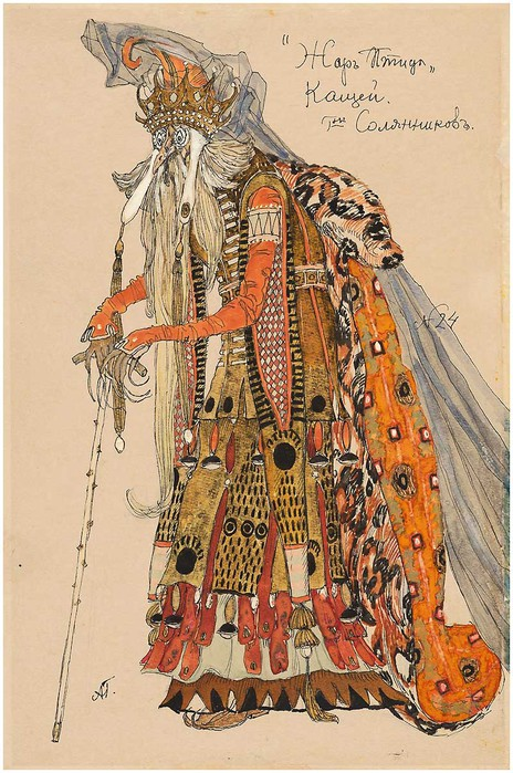 Кащей. 1921 Эскизы костюмов к балету И.Ф. Стравинского "Жар-Птица" Частное собрание